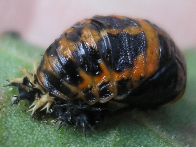 Harmonia axyridis pupa Location: Hengelo (Overijssel), Netherlands --- nl: Pop van Veelkleurig Aziatisch lieveheersbeestje (Harmonia axyridis). Locatie: Hengelo (Overijssel)